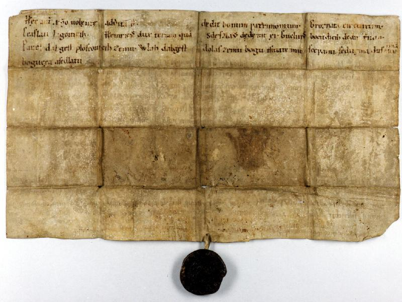 Tzv. zakládací listina litoměřické kapituly zřejmě z 11. století (další dodatky do 13. století), uložená v SOA Litoměřice, fond Kapitula Litoměřice, sign. R2. Revers - zde pouze novější přípisky. Nositel pergamen 40,2 x 23,3 cm, jazyk: latina, stará čeština (3. a 4. řádek).